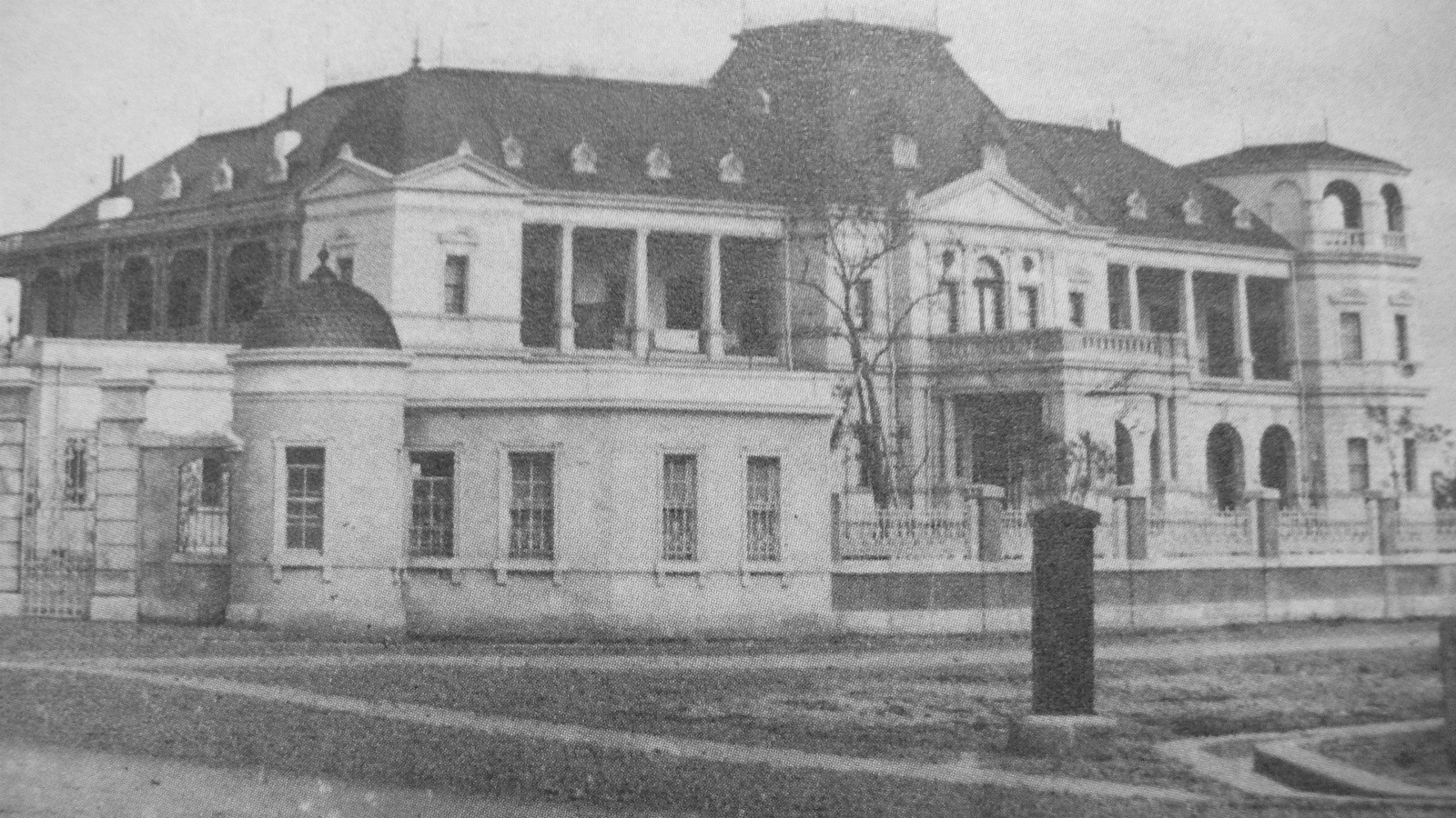 Bân-lâm-gú: Tâi-uân Tsóng-tok Kuann-tí hing-kiàn tshoo-kî bôo-iūnn, iok 1904-nî sóo liap.